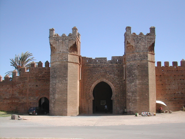 Porte de la nécropole mérinide (XIVe s.) de Chellah, Rabat, Maroc.